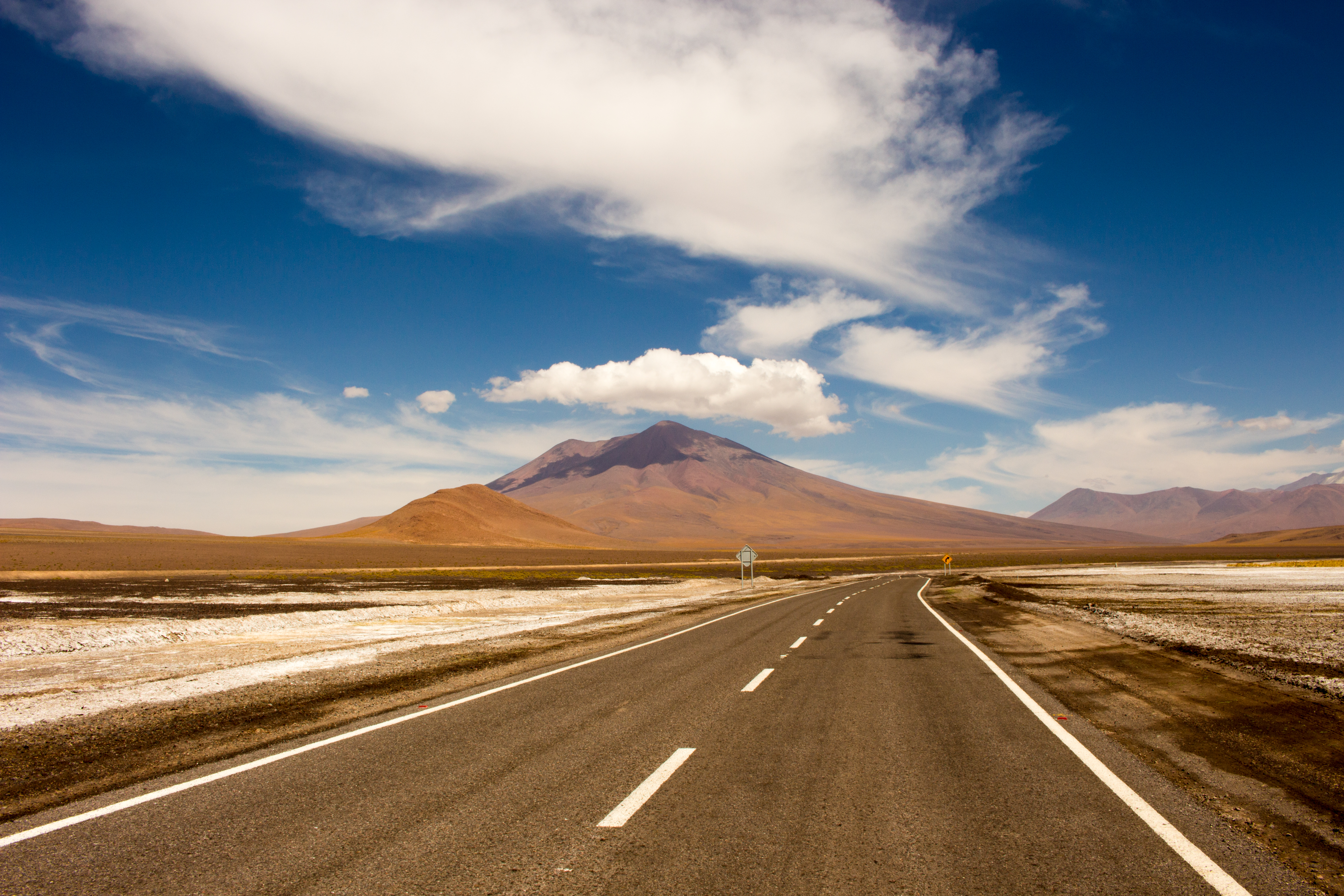 Reserva nacional Alto Loa - Ruta 21 - Frente al Salar de Ascotán